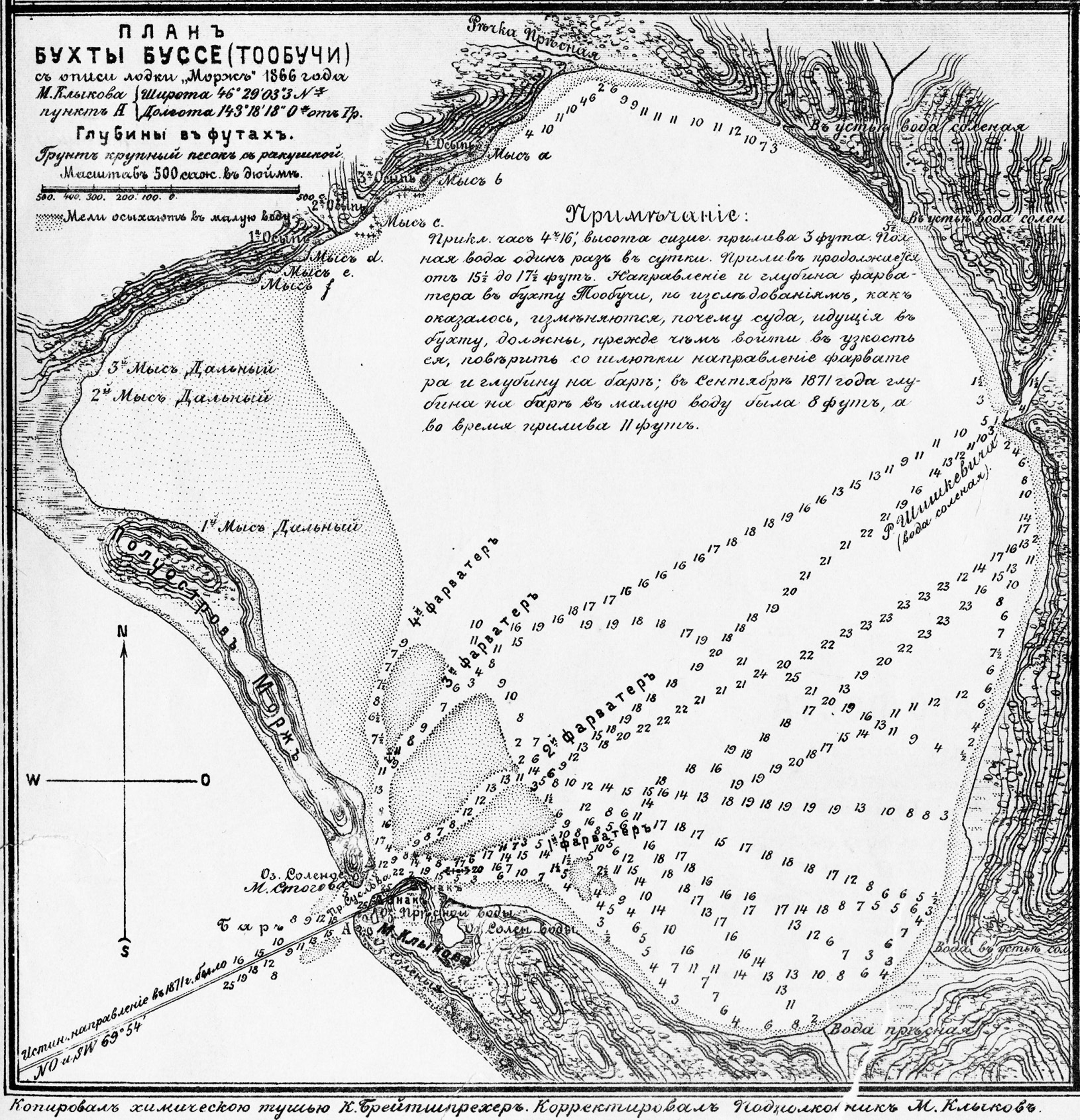 План бухты (лагуны) Буссе (Тообучи) по съемке экипажа лодки «Морж» 1866 года с пометками от 1871 года. Копировал Брейтшпрехер, корректировал М. А. Клыков